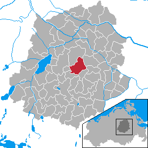 Sarow, Landkreis Demmin, Mecklenburg-Vorpommern